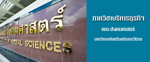 บริหารธุรกิจ